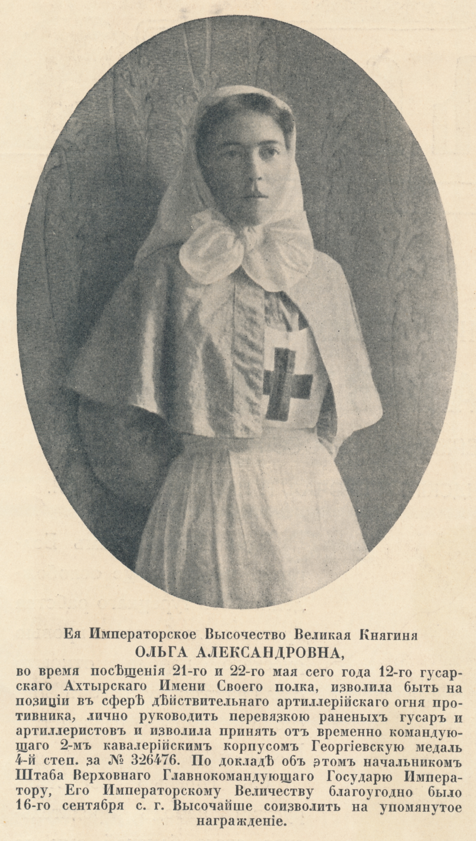 Фото Ольги Александровны в журнале "Летопись войны", 1915, № 61, с. 970.